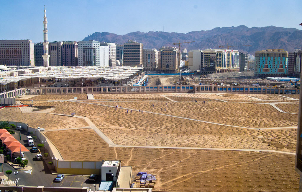 Jannat.ul.Baqi -- Madina